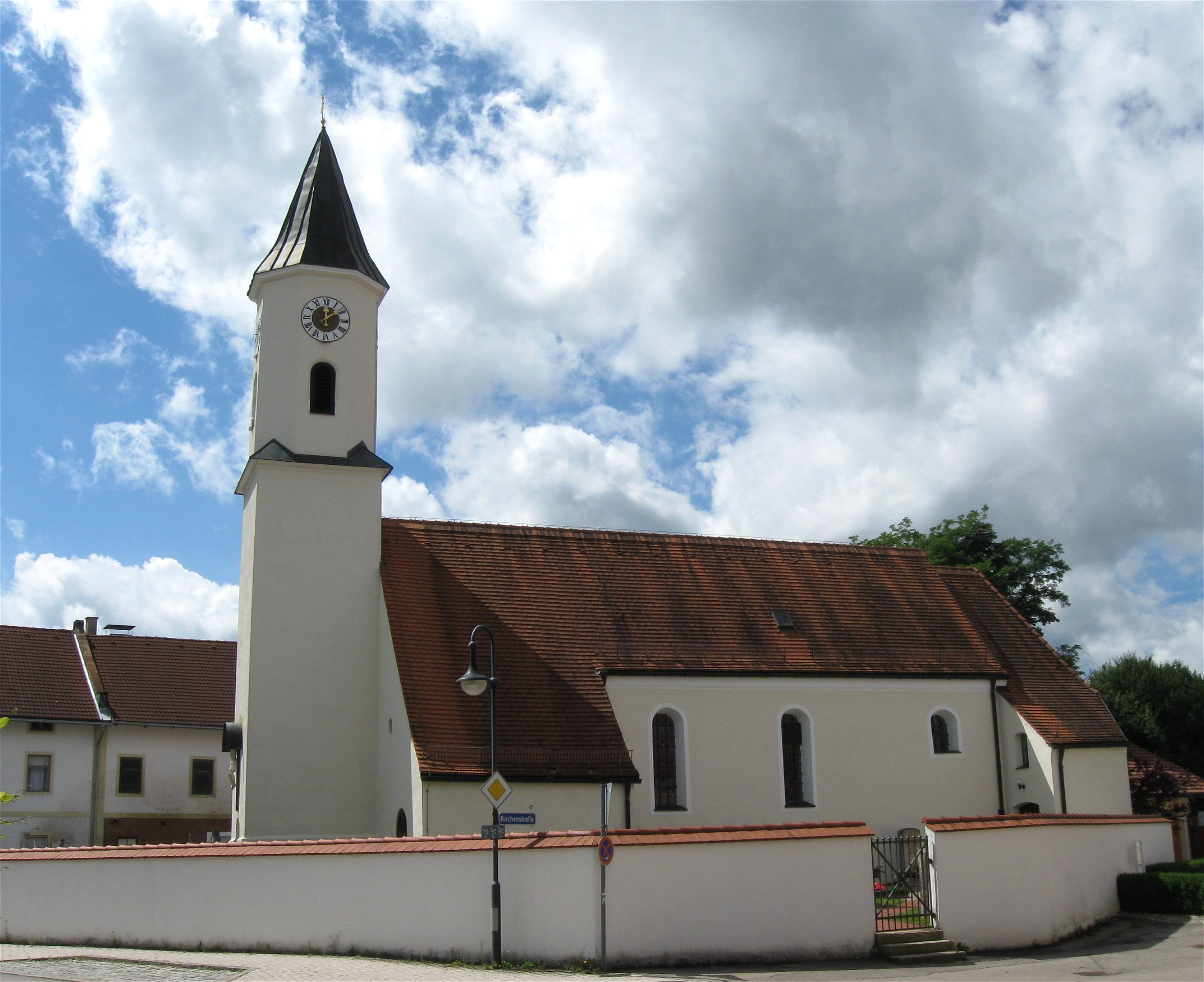 Kirchenstraße 1, Harthausen; Katholische Kirche St. Andreas. Im Kern gotischer Saalbau mit eingezogenem quadratischem Chor, Ostturm mit Spitzhelm und angefügter Sakristei, 14./ 15. Jahrhundert, Langhaus um 1870 erweitert, Turm barock. D-1-84-121-4